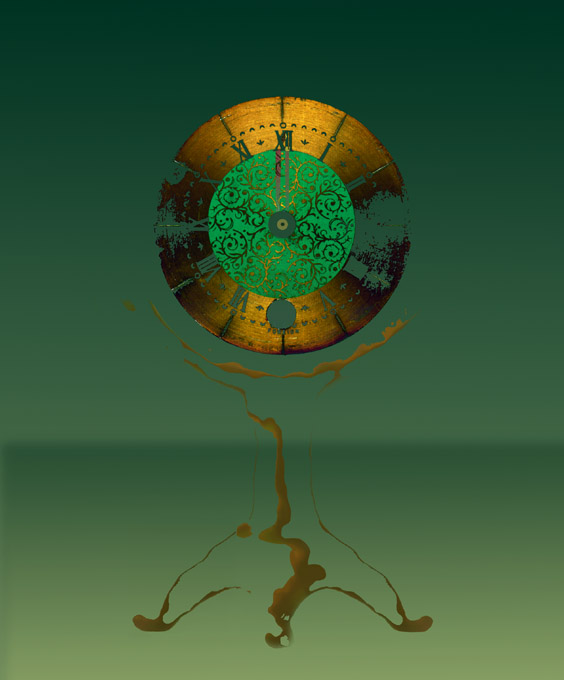 Benedek Jenő, ifj. (Csongrád, 1939. június 13.– 2019. augusztus 20.) festőművész alkotása: Álmodó óra, Év n., computergrafika